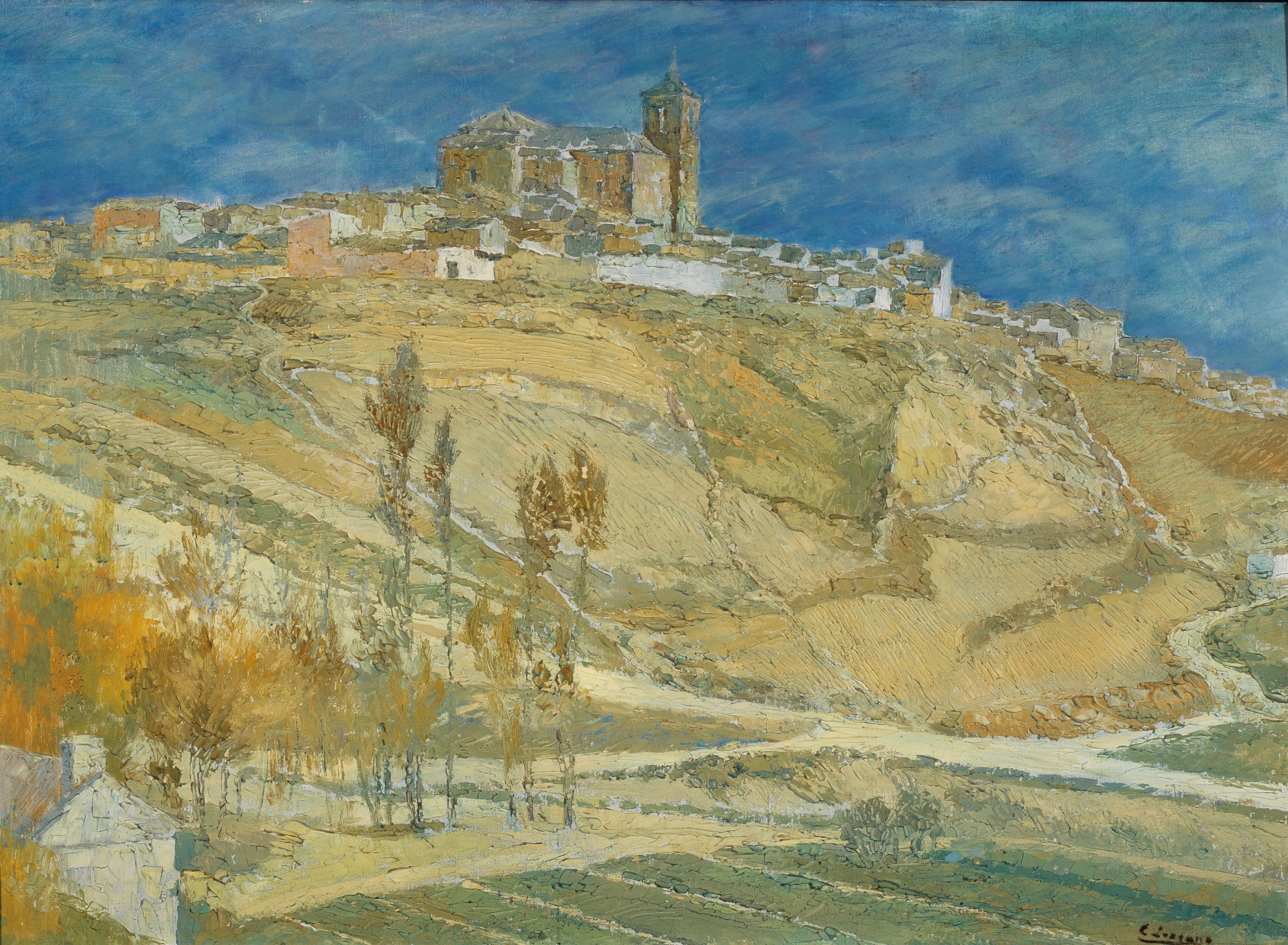 Vista general del municipio de Ocaña, en la provincia de Toledo, (España).